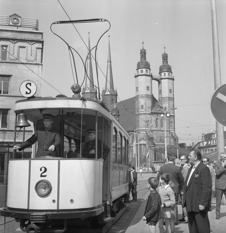 Zentralbild Schaar 27.7.70-kat-Halle: Straßenbahntraditionswagen auf dem Altmarkt- Große Freude bereitet vielen Hallensern und den Gästen der Saalstadt ein Straßenbahntraditionswagen, der orginal von Lehrlingen der VE Verkehrsbetrieben Halle nachgebaut wurde. Bisher wurden über 10000 Fahrgäste mit ihm befördert.